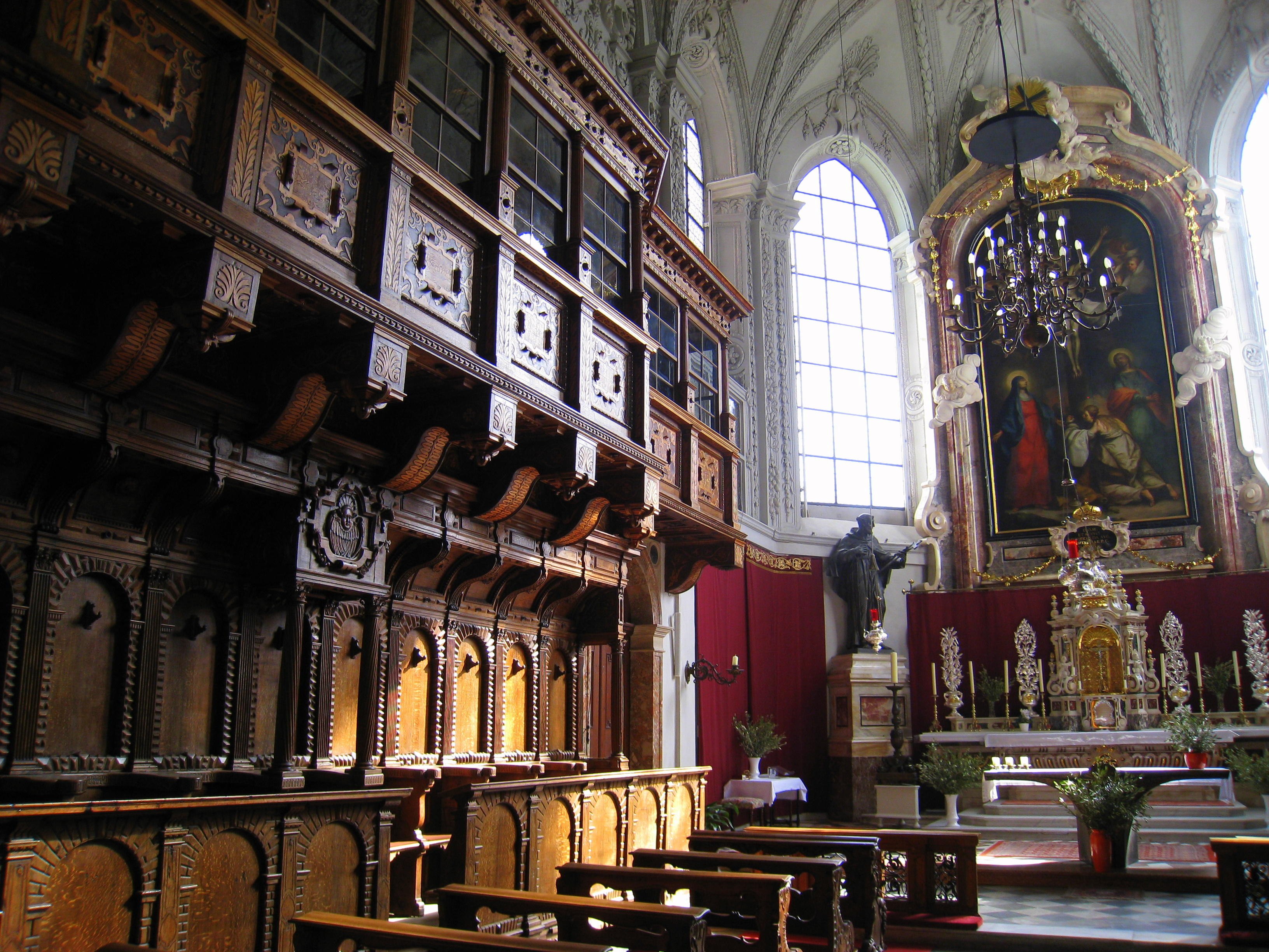 Hofkirche, Innsbruck, Austria - altar.